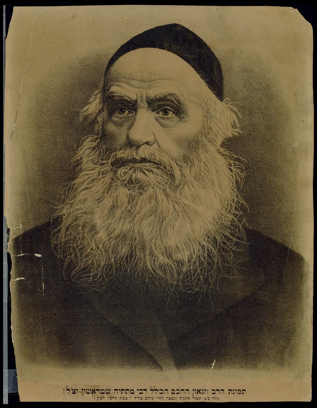 הדפס בגודל 24.5X31.5 ס"מ ובו ציור דיוקנו של הרב מתתיהו שטראשון. תחת דיוקנו, נדפסו בעברית שמו ותאריכי חייו. כפי הנראה, הדפס זה הופק במאה התשע עשרה, סמוך לפטירתו של שטרשון. בגב ההדפס, הוטבעה חותמת המעידה כי הוא נתרם לבית הספרים הלאומי על ידי ד"ר יוסף חזנוביץ', ביאליסטוק.